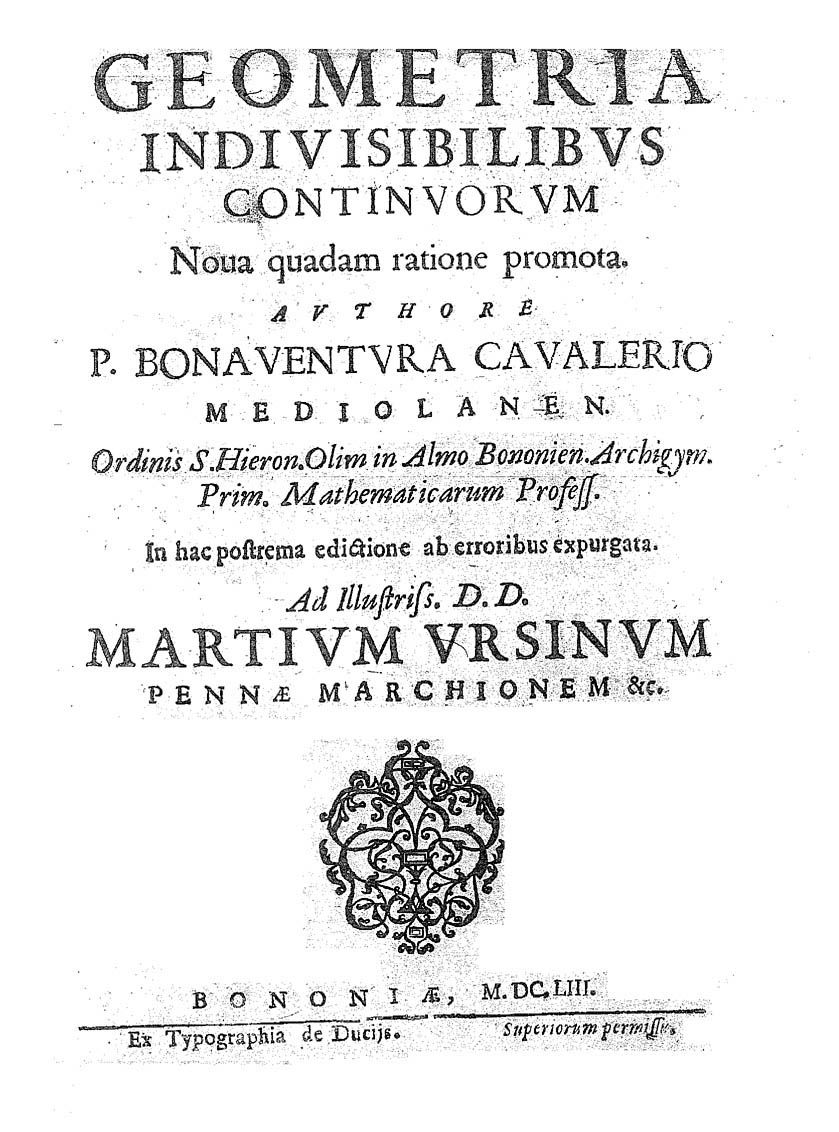 Geometria indiuisibilibus continuorum noua quadam ratione promota. Authore p. Bonauentura Caualerio .... - Bononiae : ex typographia de Ducijs, 1653. - [16], 543, [1] p. : ill. ; 4º .